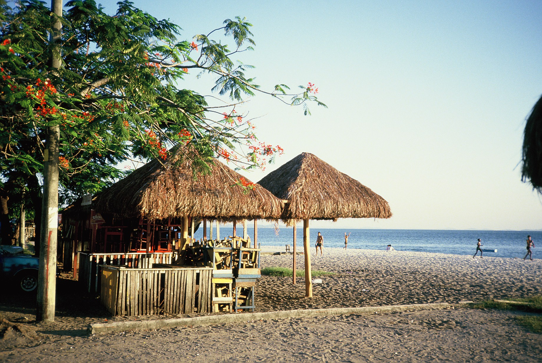 Porto Seguro, Strand, Bahia